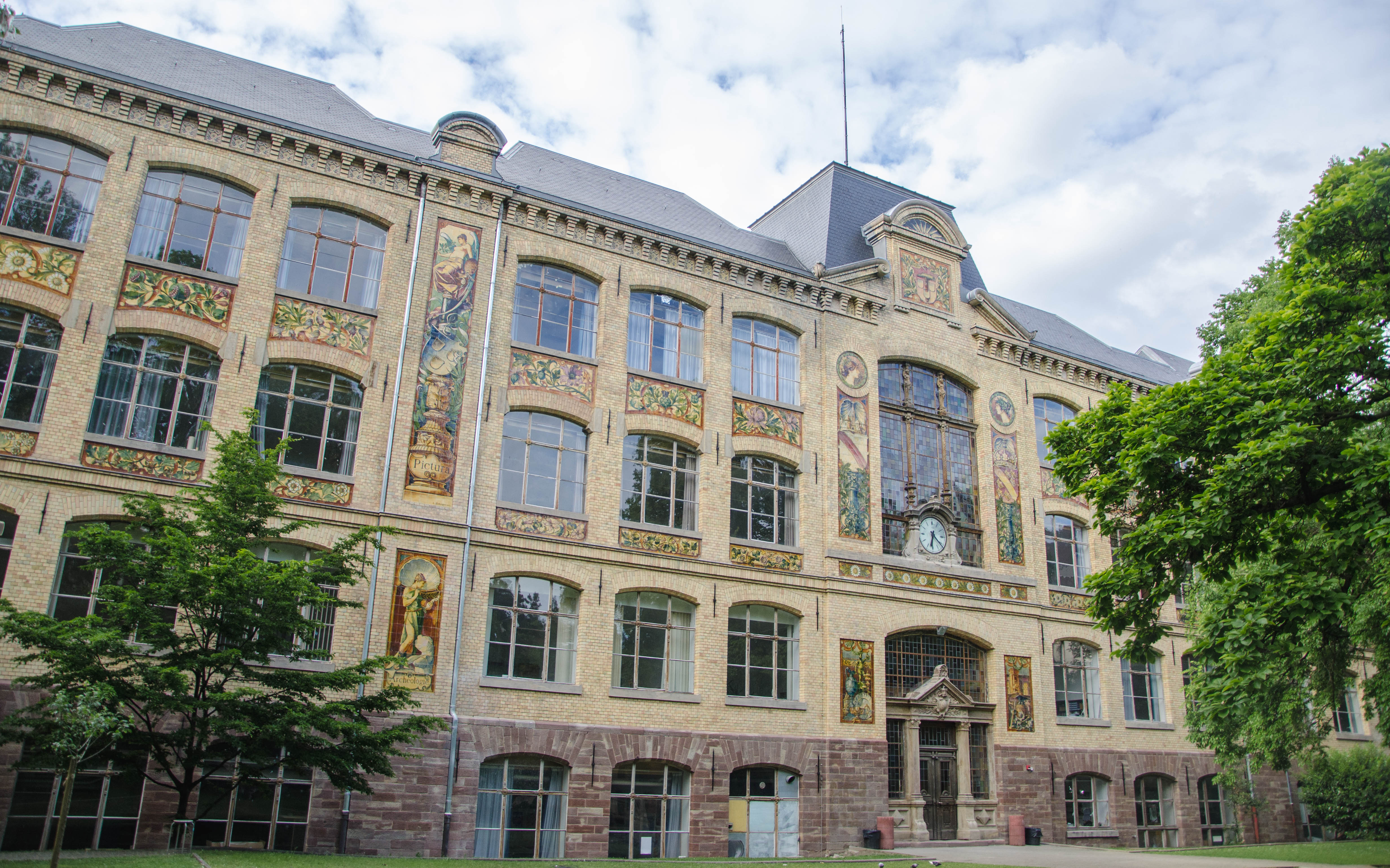 Le jardin botanique laissa place à fin du XIXe à l'école des arts décoratifs. Ce bâtiment, de style art nouveau, richement décoré sur sa façade met l'accent sur de nombreux arts qui étaient pratiqués dans ses murs. Plusieurs de ces ornements ont même été réalisé par des élèves de l'époque.